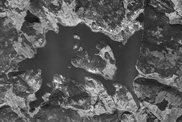 Vågsfjärden och Prästön, Kramfors kommun